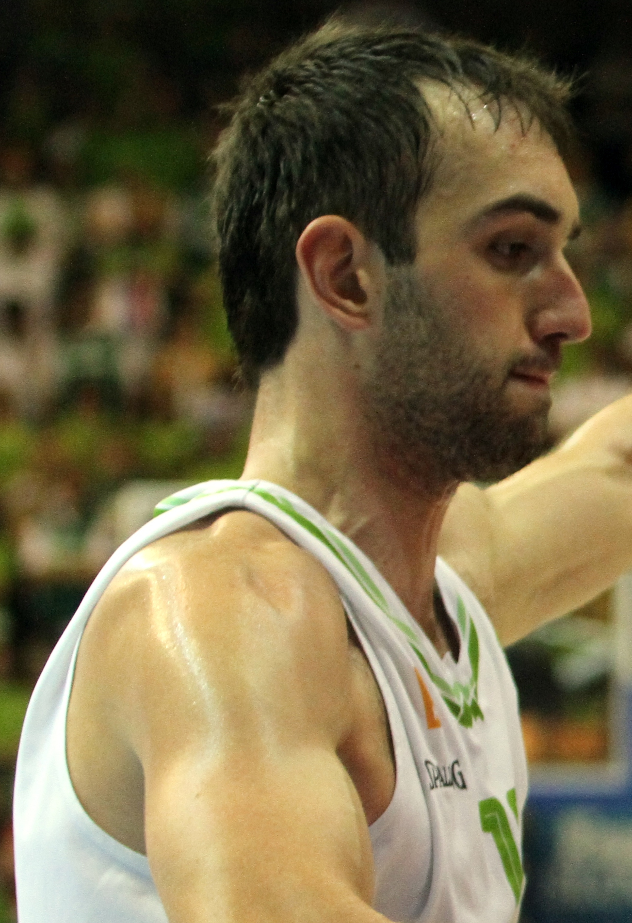 Mirza Begić.